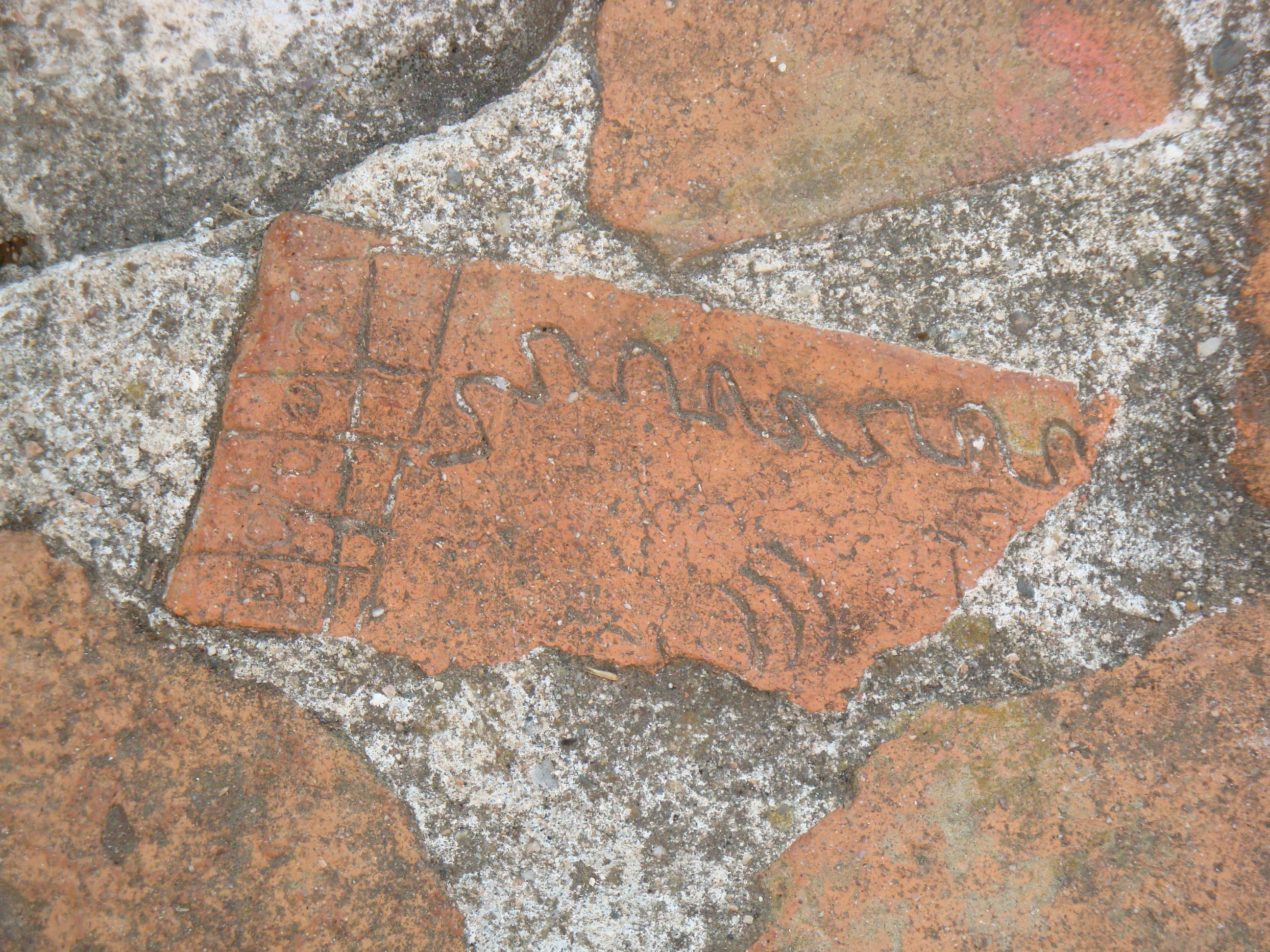 Ladrillo grabado, localizado en el piso de una construcción, en la ciudad maya de Comalcalco, Tabasco, México.